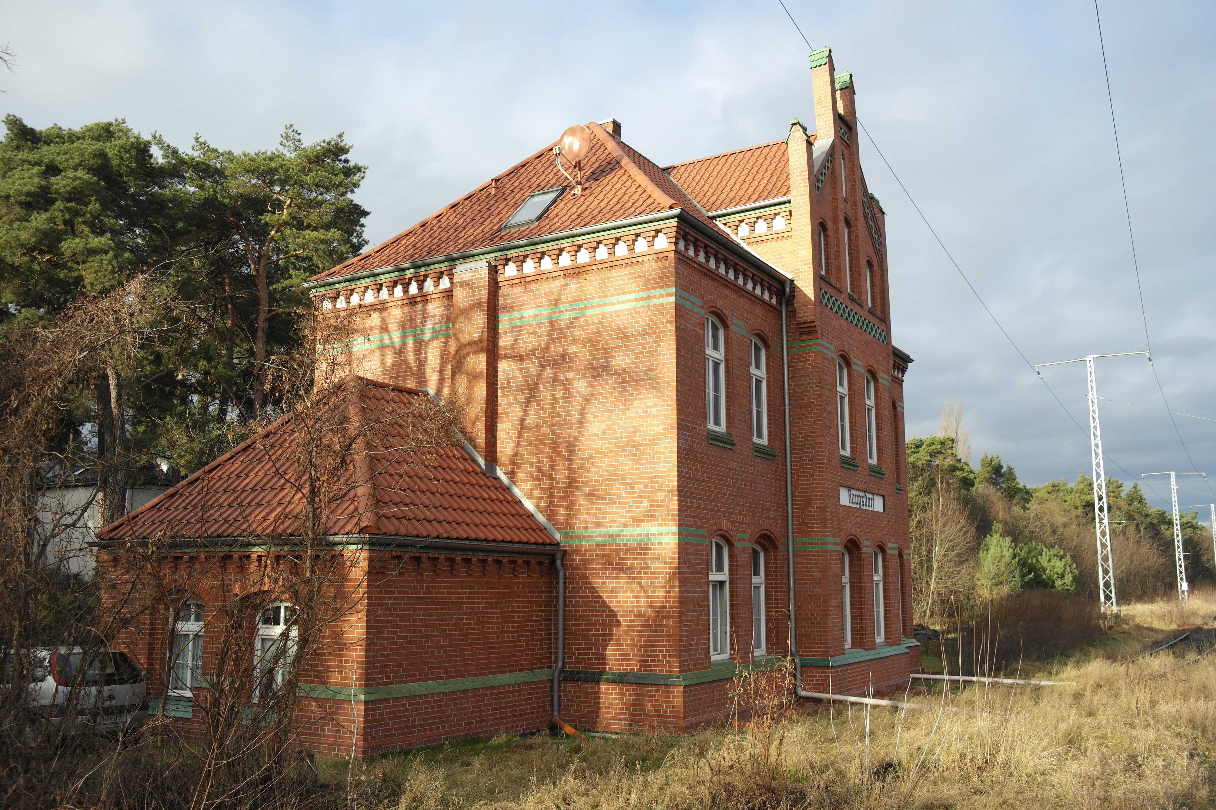 Rangsdorf, denkmalgeschützter Bahnhof der Königlich-Preußischen Militäreisenbahn.